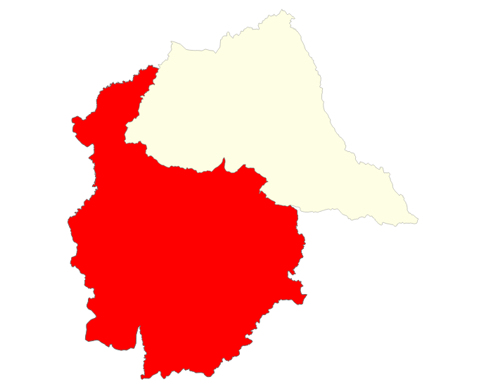 Localisation du district de Tsiroanomandidy dans la région Bongolava